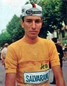 Felice Gimondi en 1966, 'Campioni dello Sport 1966', figurina Panini n°187.